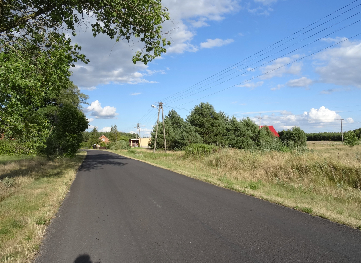 Nowa Wioska, gmina Nowa Wieś Wielka, powiat bydgoski